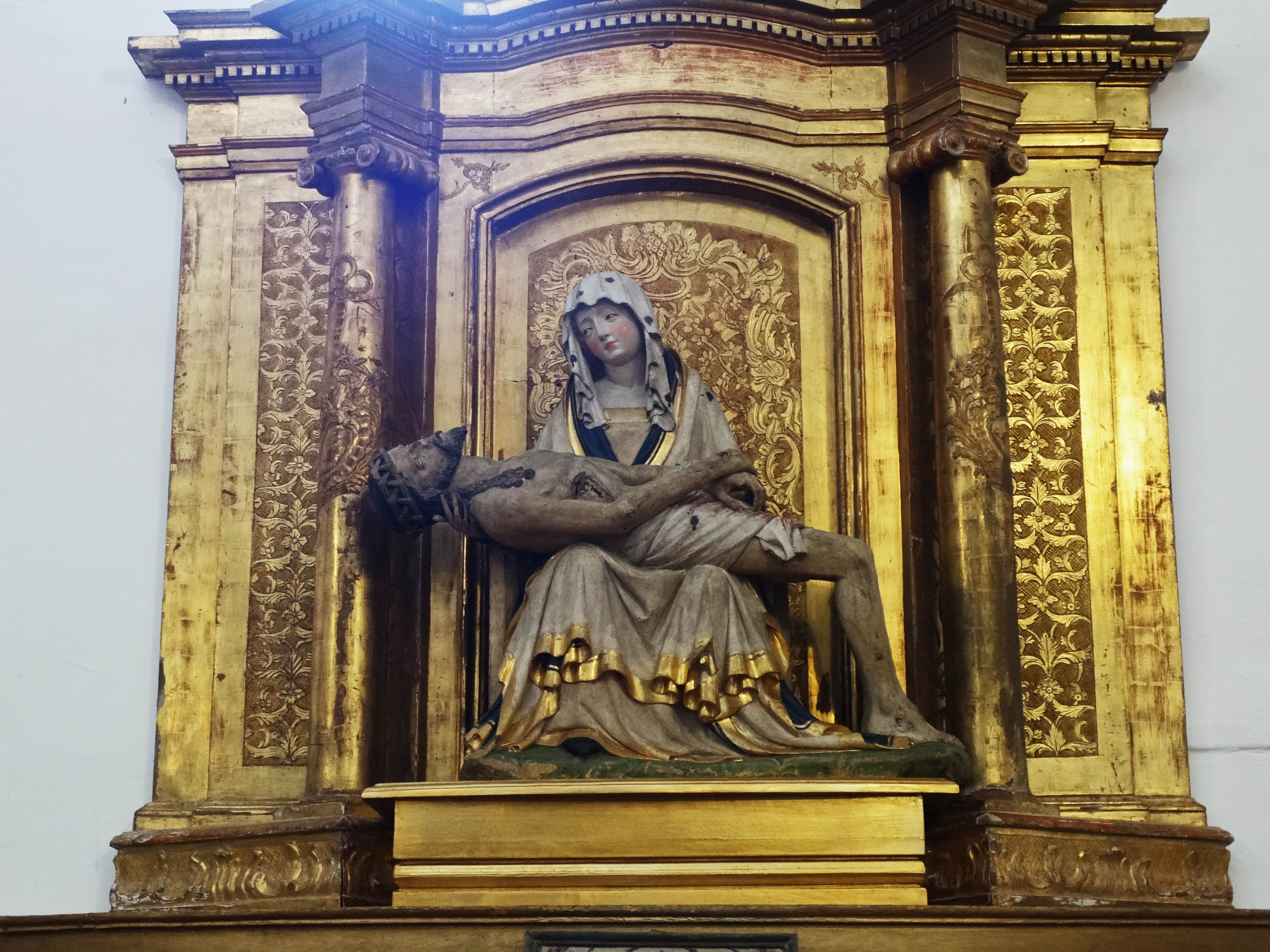 Escultura en piedra caliza policromada de la Piedad14 (0,76 m.). De comienzos del siglo XV, es una obra gótica importada de talleres austro-bohemios, cuya tipología está inspirada en las revelaciones de Santa Brígida. Venerada bajo la advocación de Nuestra Señora de la Compasión o de Aniago. Patrimonio disperso que se encuentra en la iglesia de la Visitación de Villanueva de Duero (Valladolid).